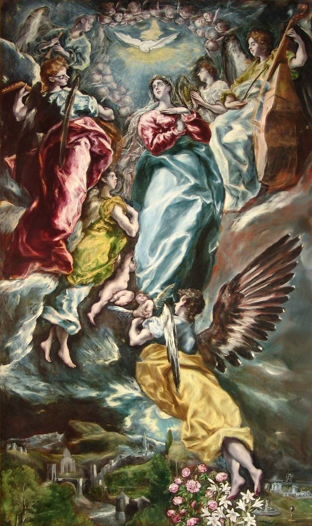 La obra representa la Inmaculada Concepción de la Virgen María.